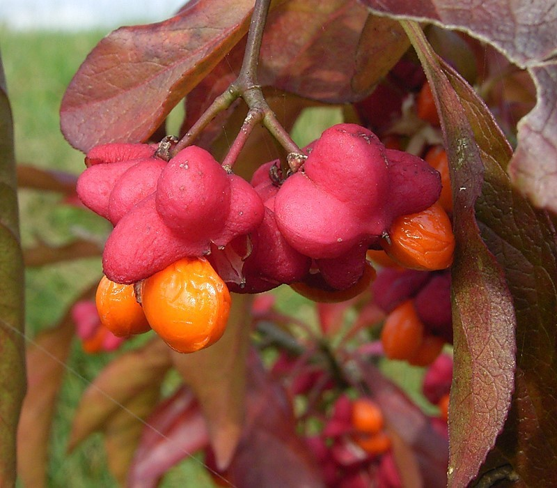 Euonymus europaeus